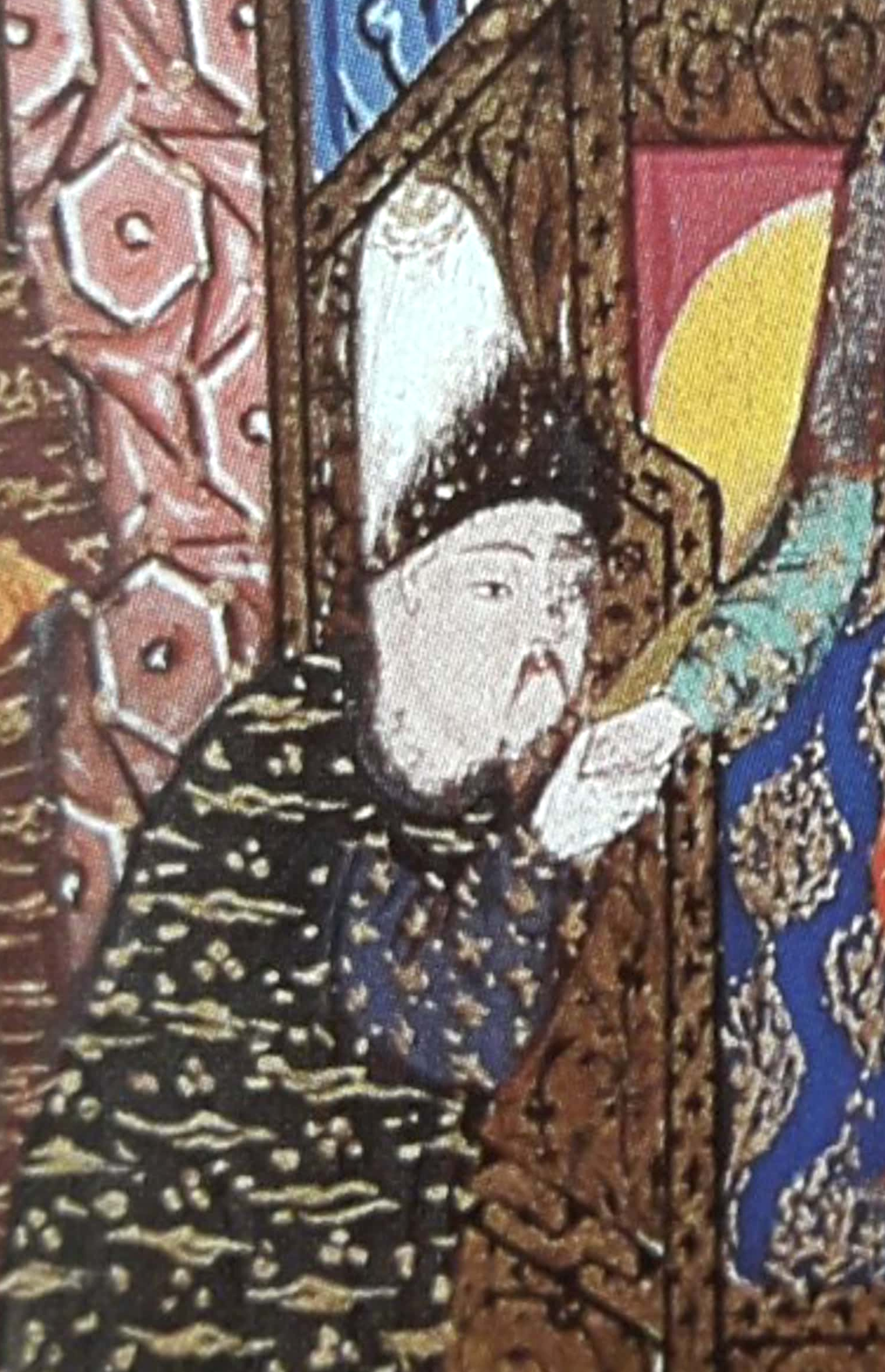 Девлет Герай, хан Крыма. Фрагмент турецкой миниатюры 16 века